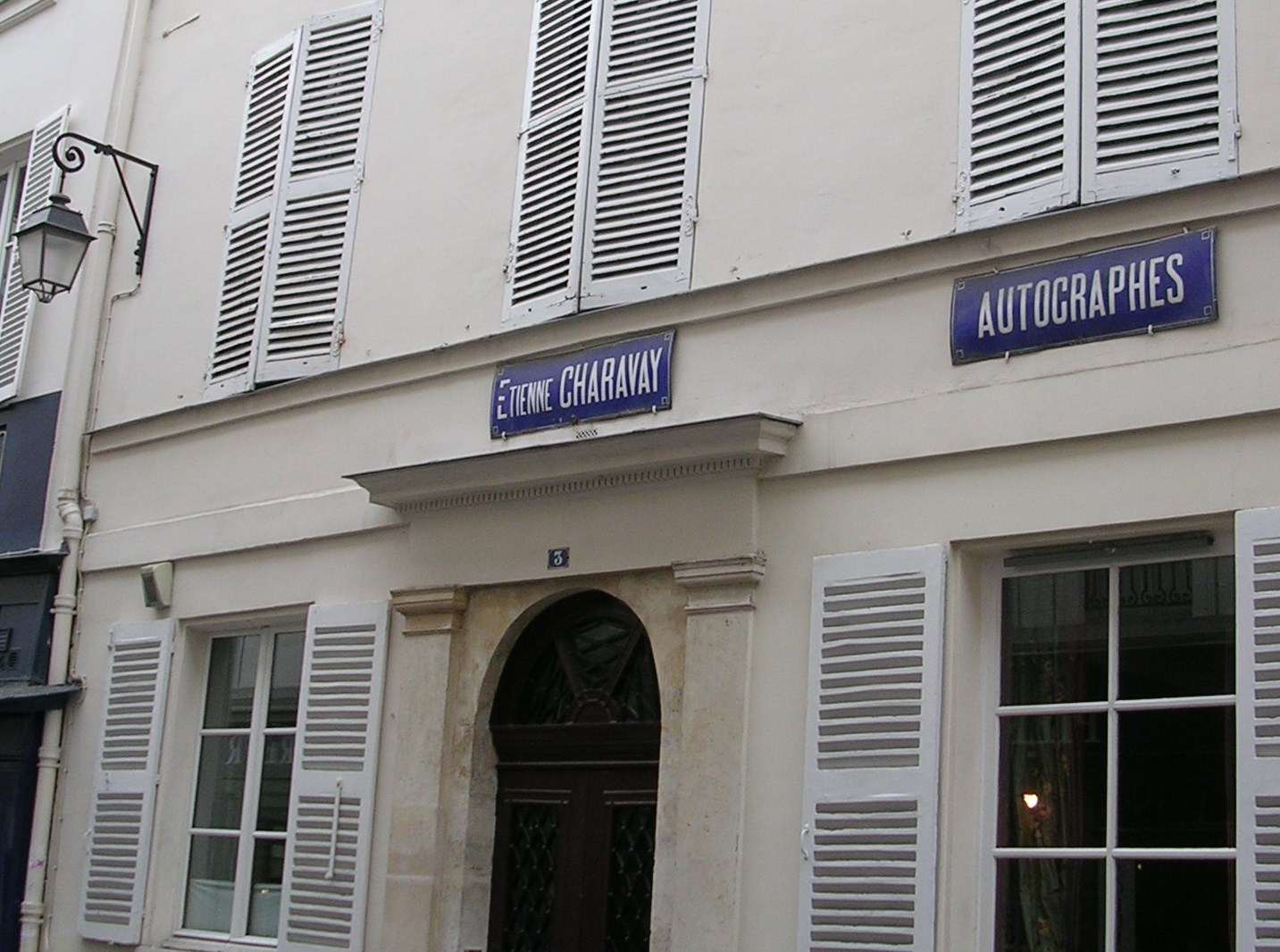 Photographie de la Maison Charavay rue de Furstenberg à Paris